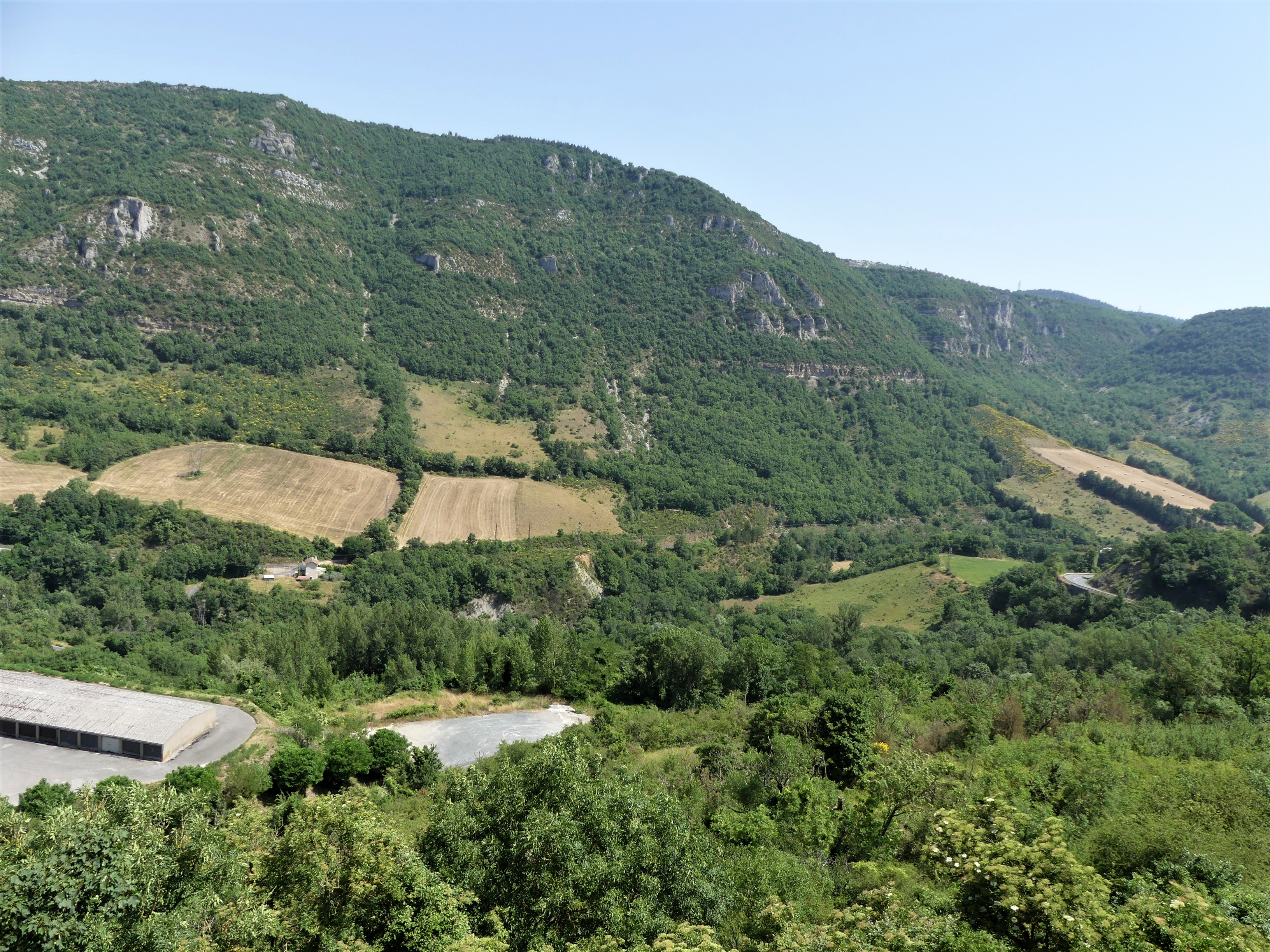 La vallée du Soulzon vue depuis Roquefort-sur-Soulzon, Aveyron, France. Vue prise en direction de l'amont.